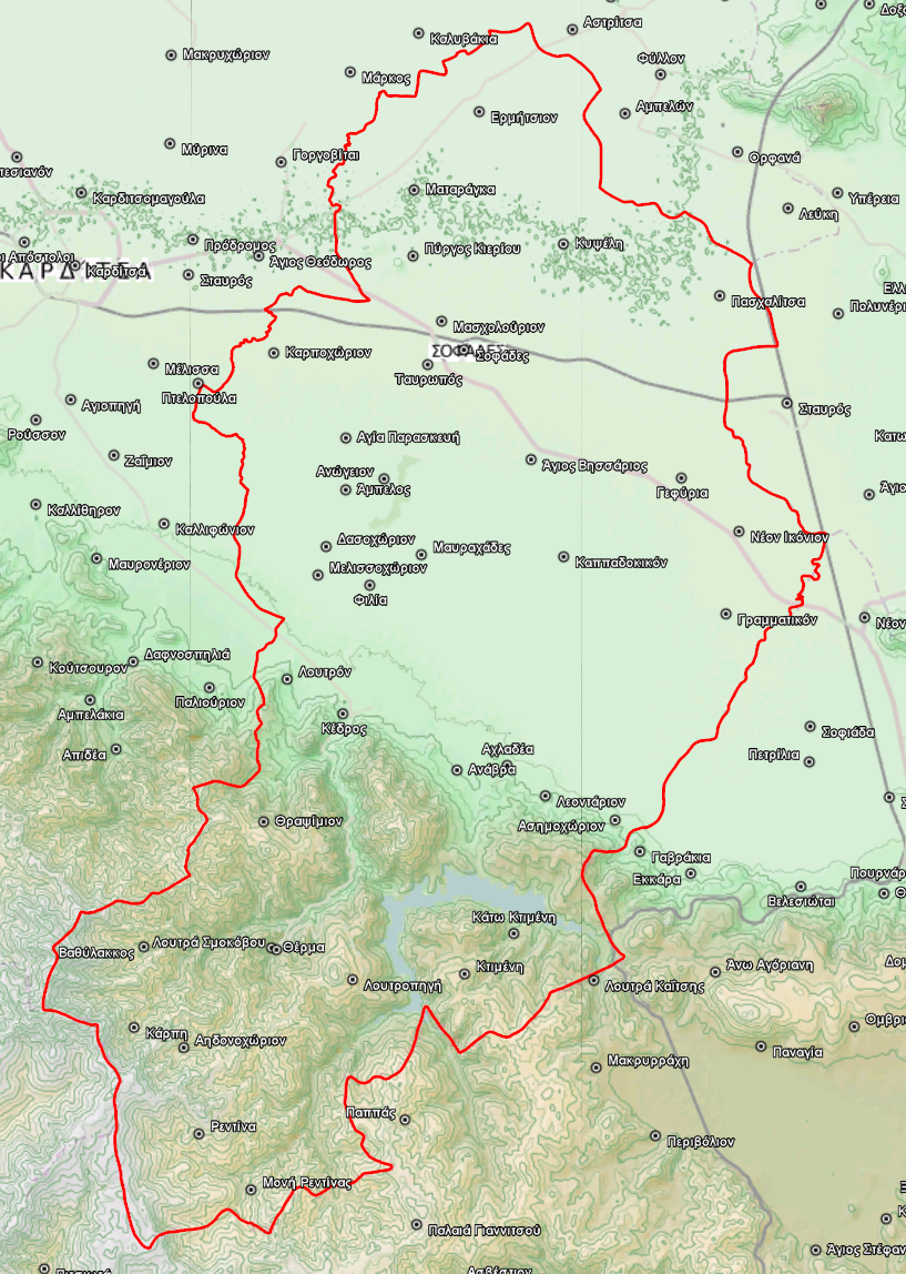 Τοπογραφικός χάρτης του Δήμου Σοφάδων